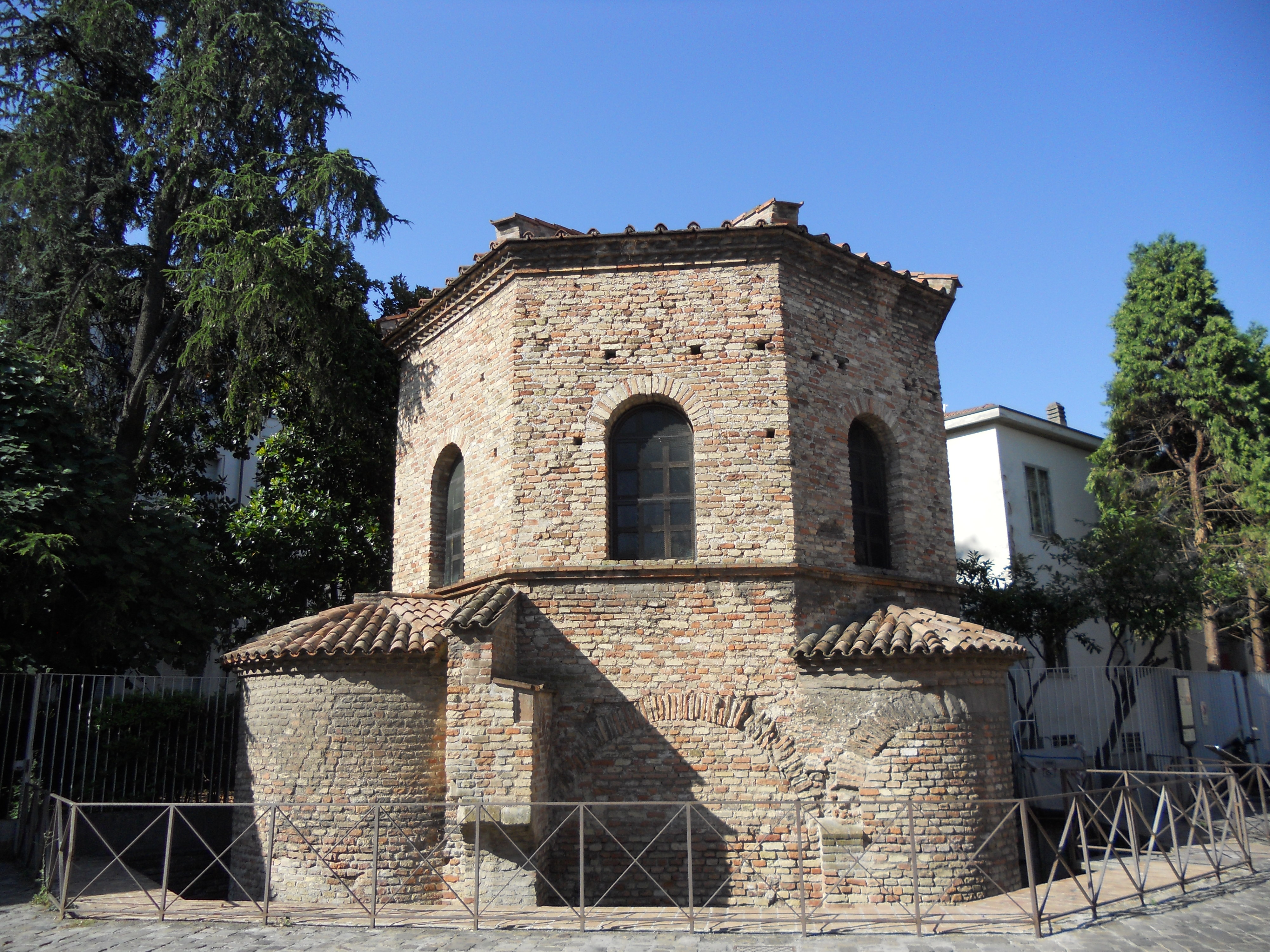 Battistero degli Ariani This is a photo of a monument which is part of cultural heritage of Italy.